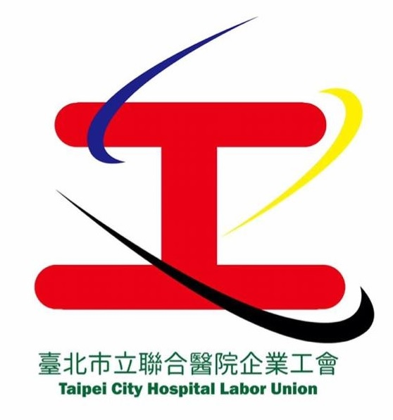 臺北市立聯合醫院企業工會標誌。